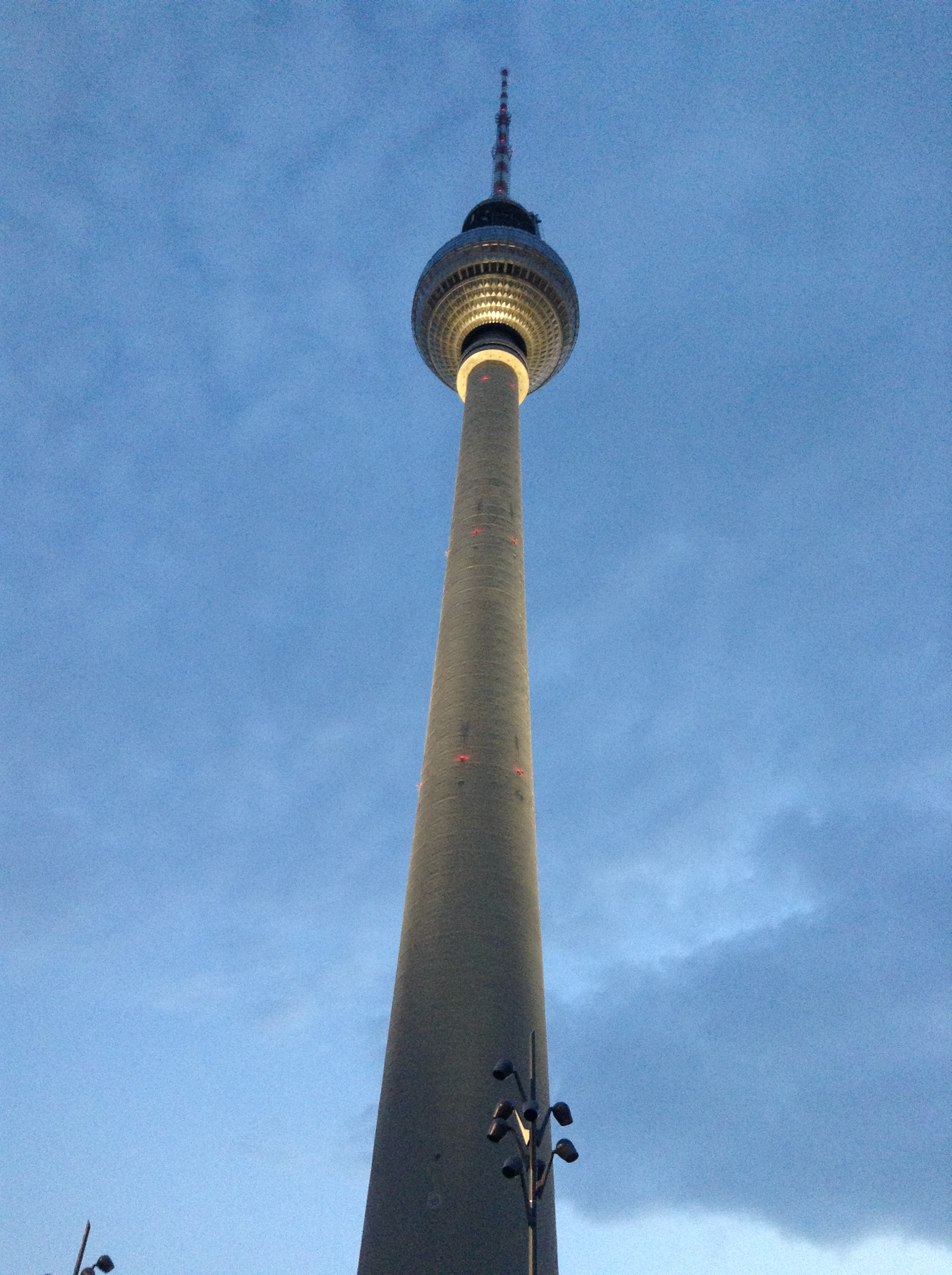 Fernsehturm di sera